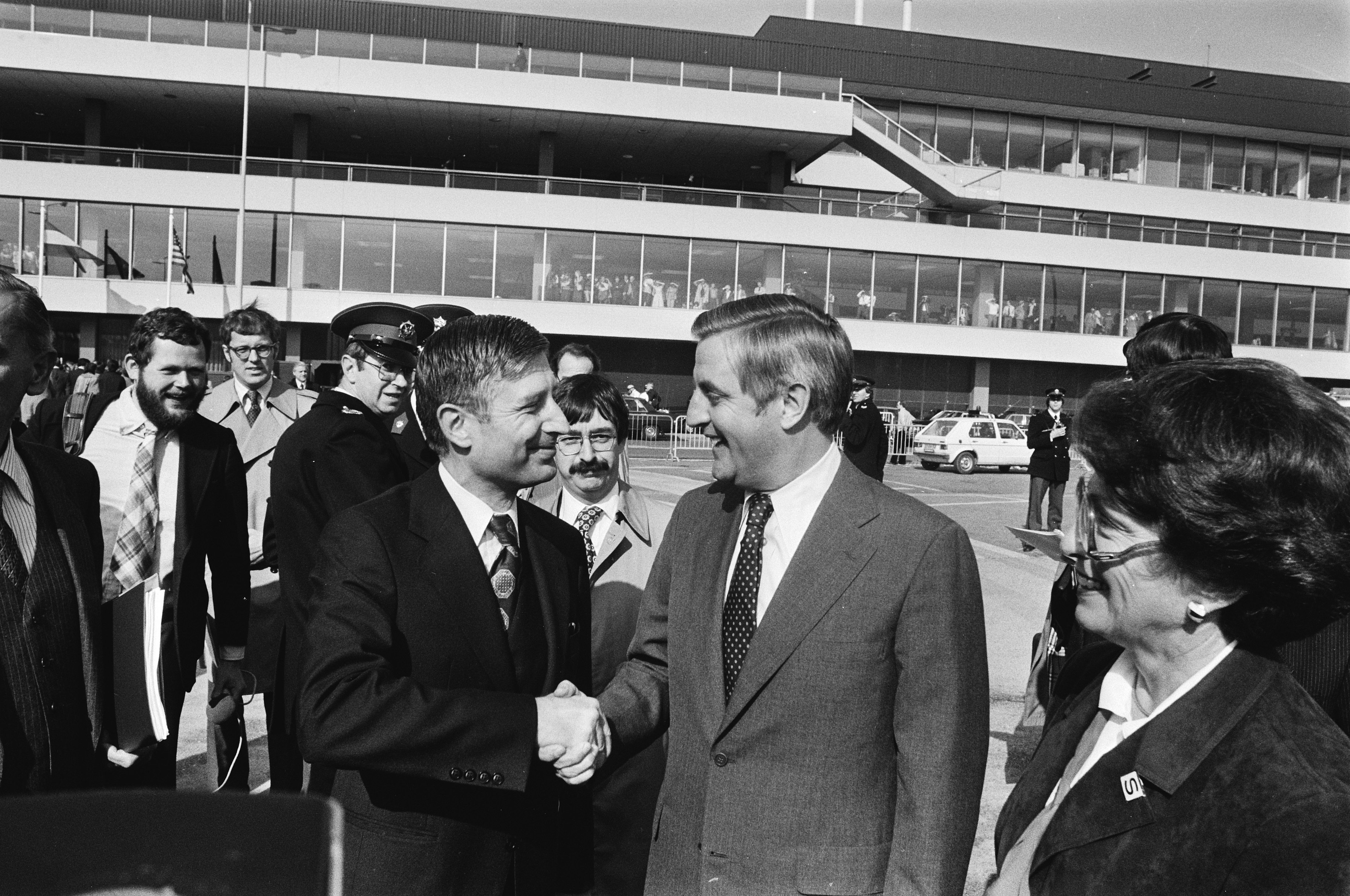 Collectie / Archief : Fotocollectie Anefo Reportage / Serie : Amerika's vice president Walter Mondale een dag in Nederland Beschrijving : Mondale wordt op Schiphol begroet door premier van Agt Datum : 21 april 1979 Locatie : Noord-Holland, Schiphol Trefwoorden : politici, premiers Persoonsnaam : Agt, Dries van, Mondale, Walter Fotograaf : Bogaerts, Rob / Anefo Auteursrechthebbende : Nationaal Archief Materiaalsoort : Negatief (zwart/wit) Nummer archiefinventaris : bekijk toegang 2.24.01.05 Bestanddeelnummer : 930-2242